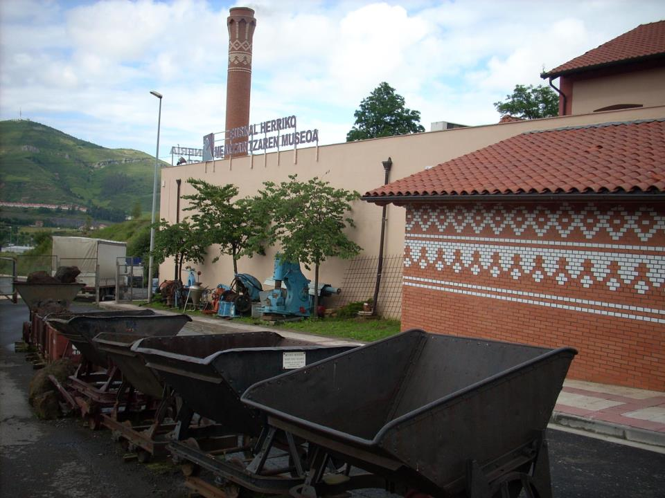 Museo de la Minería del País Vasco - Euskal Herriko Meatzaritzaren Museoa